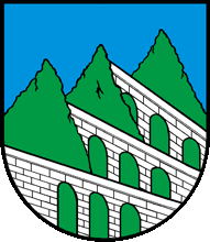 Armoiries de l'ancienne commune de Fleurier. Auteur : Gérard Crameri